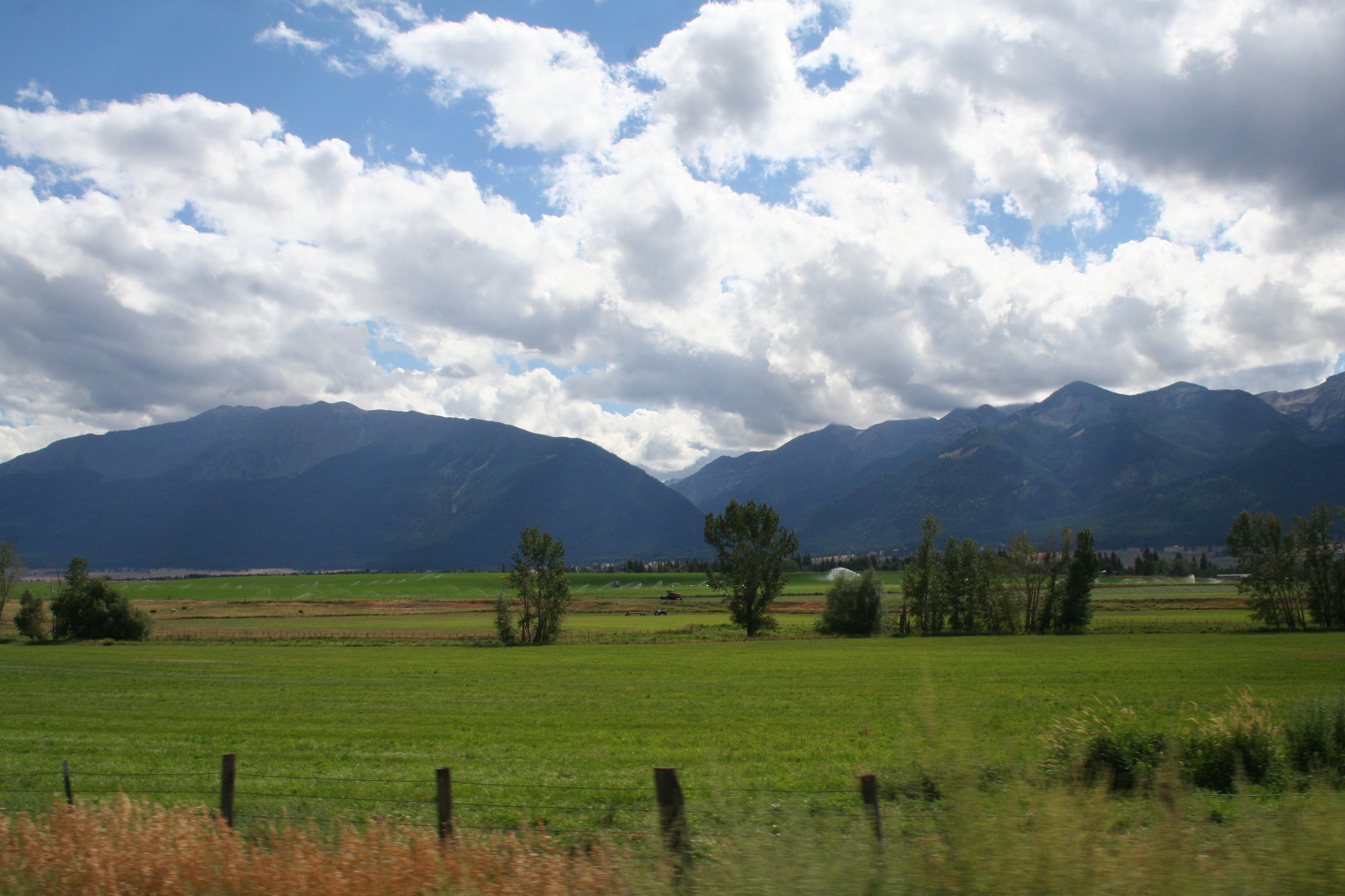 A farm near Enterprise, Oregon.